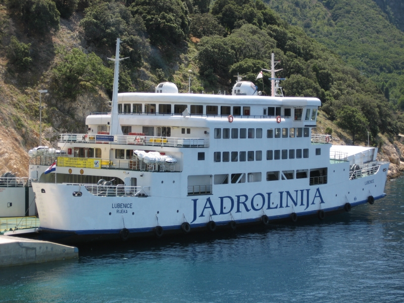 Jadrolinijin trajekt Lubenice u Meragu IMO number: 8351118 Callsign: 9A6503